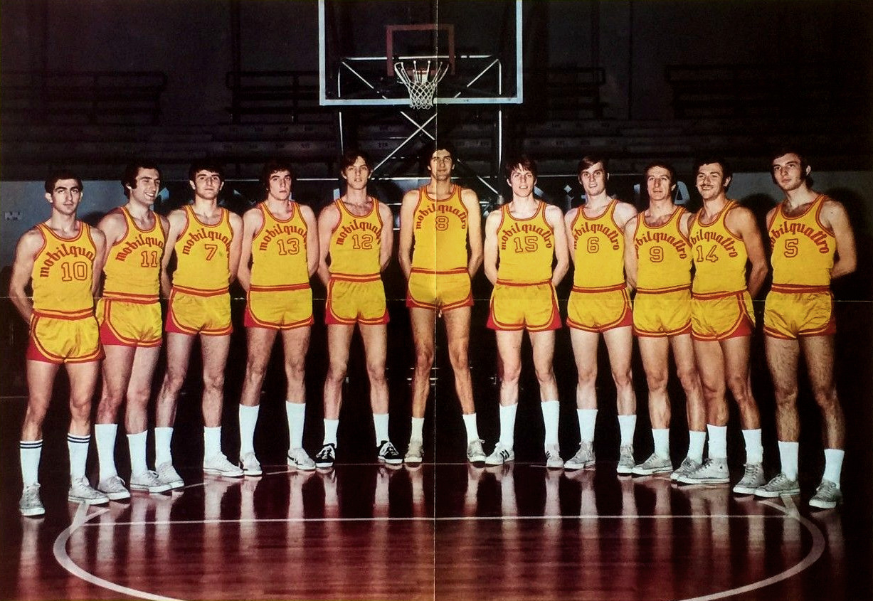 Milan, Italy. Line-up of Pallacanestro Milano 1958, know for sponsorship reasons as Mobilquattro Milano, in the 1971–72 season. From left to right: G. Zanetti, P. Polzot, M. Giroldi, A. Grasselli, D. Grey, M. Lucarelli, F. Nizza, G. Papetti, A. Barlucchi, E. De Rossi, P. Masier.